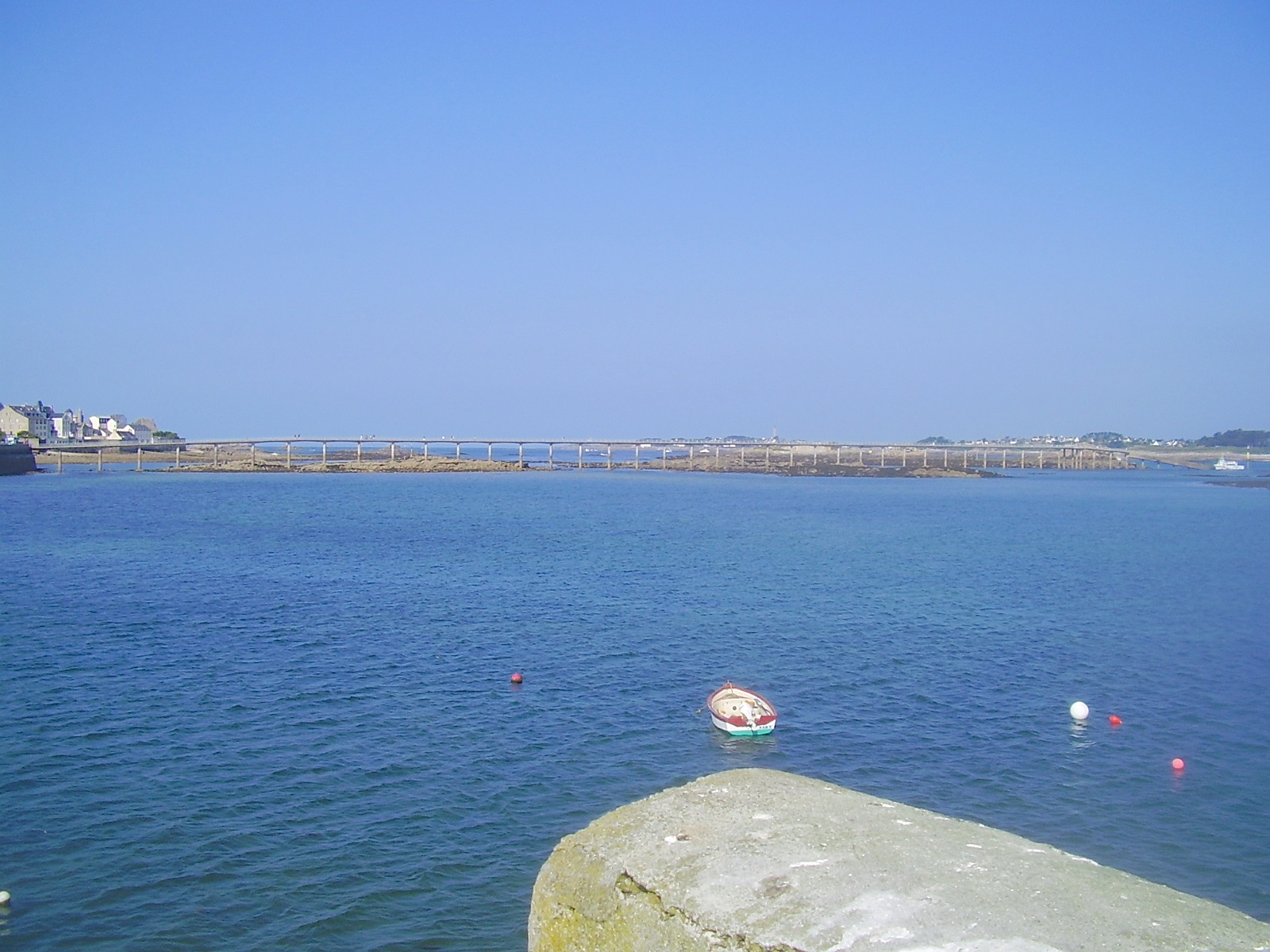 Embarcadère de l'île de Batz à Roscoff, ou pont menant à une navette des terres vers l'île.